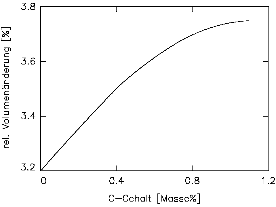 Einfluss des Kohlenstoffgehaltes C auf die relative Volumen­vergrößerung bei der Umwandlung von Austenit in Martensit